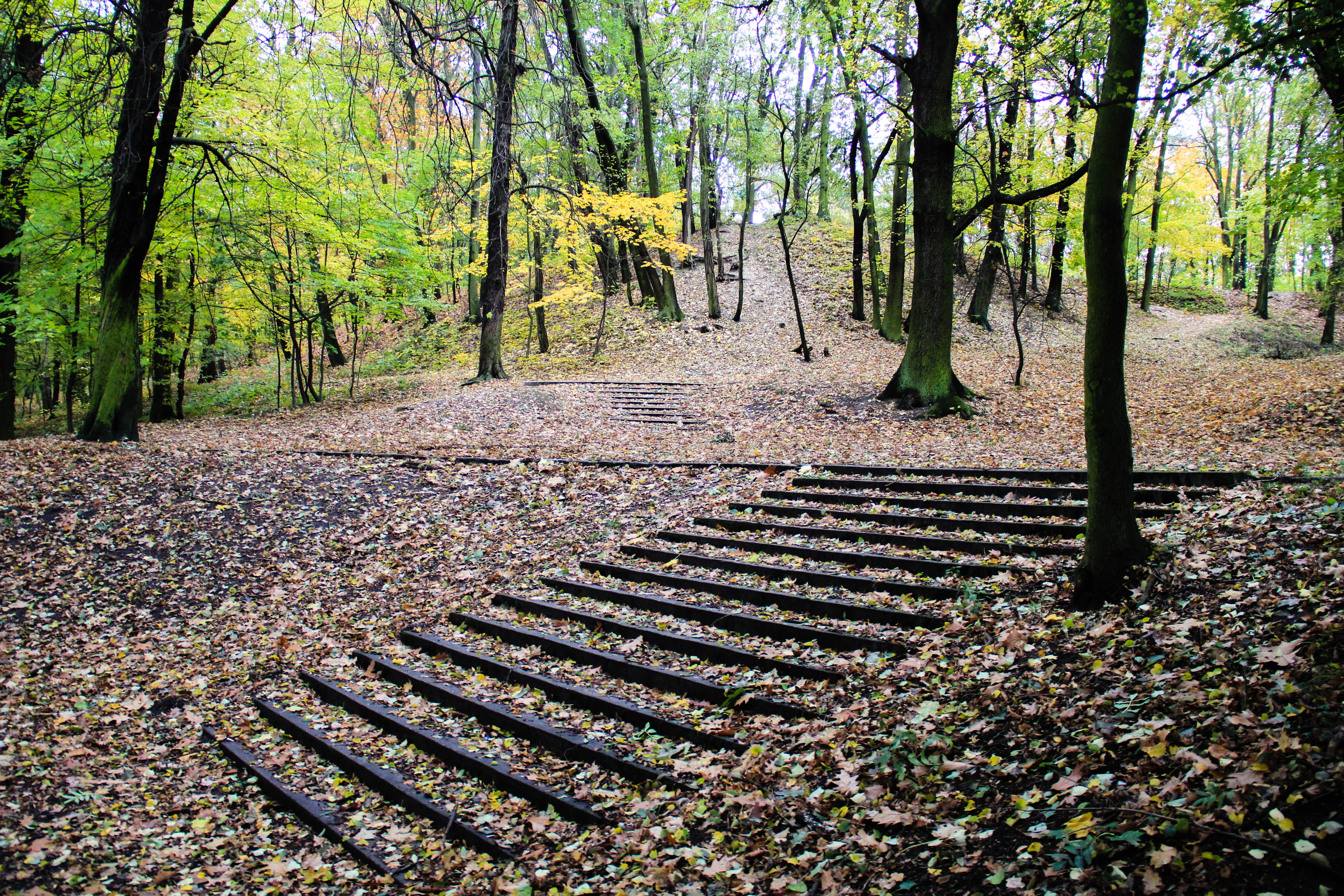 Schody prowadzące w kierunku Wzgórza Chmielowego w Parku Piastowskim w Chojnowie